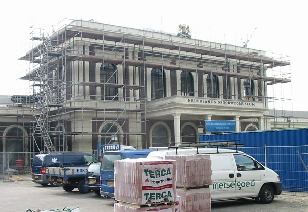 Nederlands Spoorwegmuseum, verbouwing hoofdgebouw